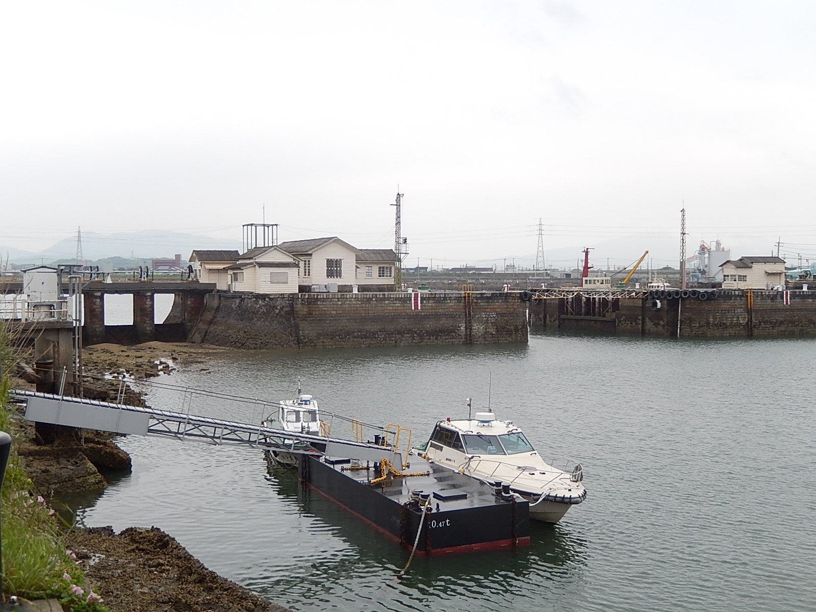 世界遺産推薦物件「明治日本の産業革命遺産群」構成資産、三池港・閘門／潮待ち内港側から－干潮